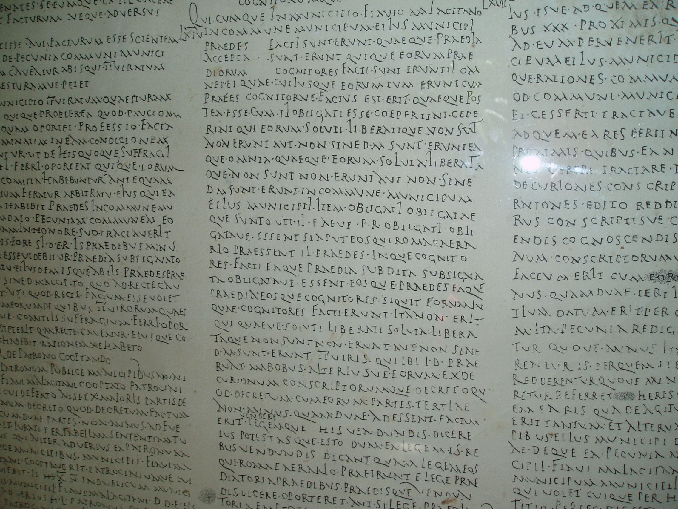 Leyes romanas en el Museo Loringiano de Málaga. Copia de CIL II 1964 = EE IX, 91 = AE 2001, 61